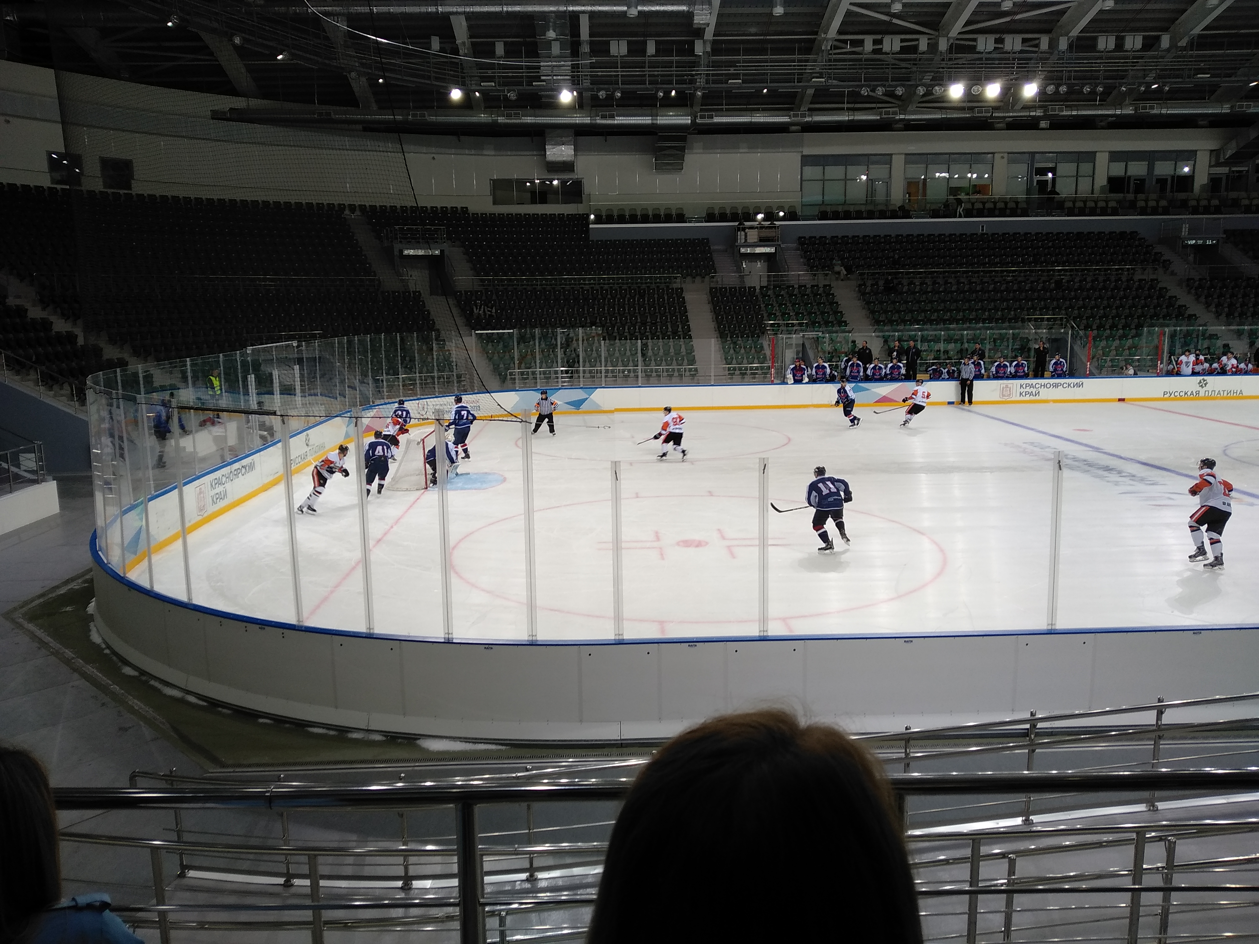 матч между Соколом и Ермаком 10 августа 2018 в Платинум Арене